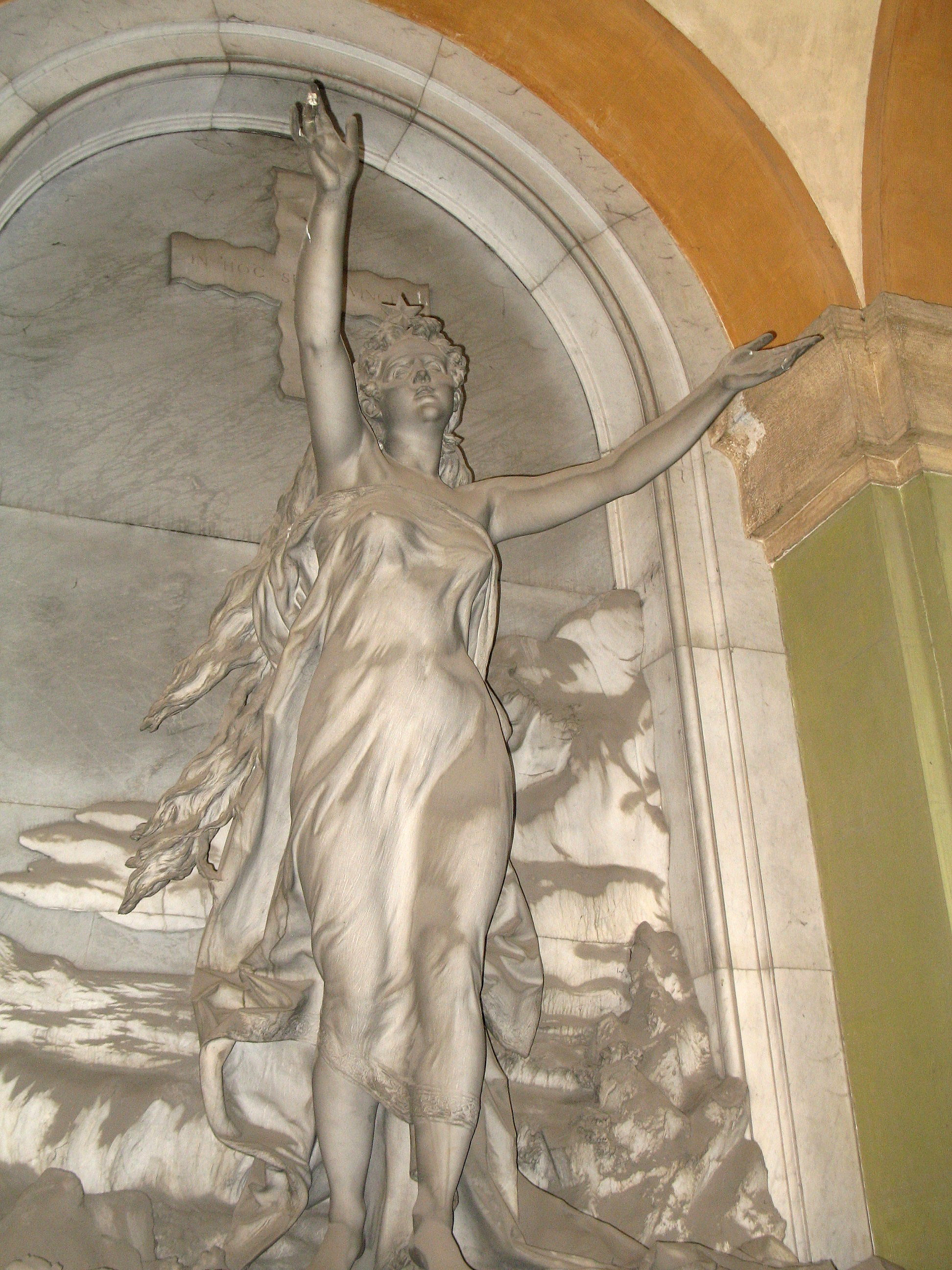 Statua della Speranza, scolpita da Giovanni Scanzi, dal monumento della famiglia Ghilino, nel Cimitero monumentale di Staglieno, Genova. 1880s Today. Today.